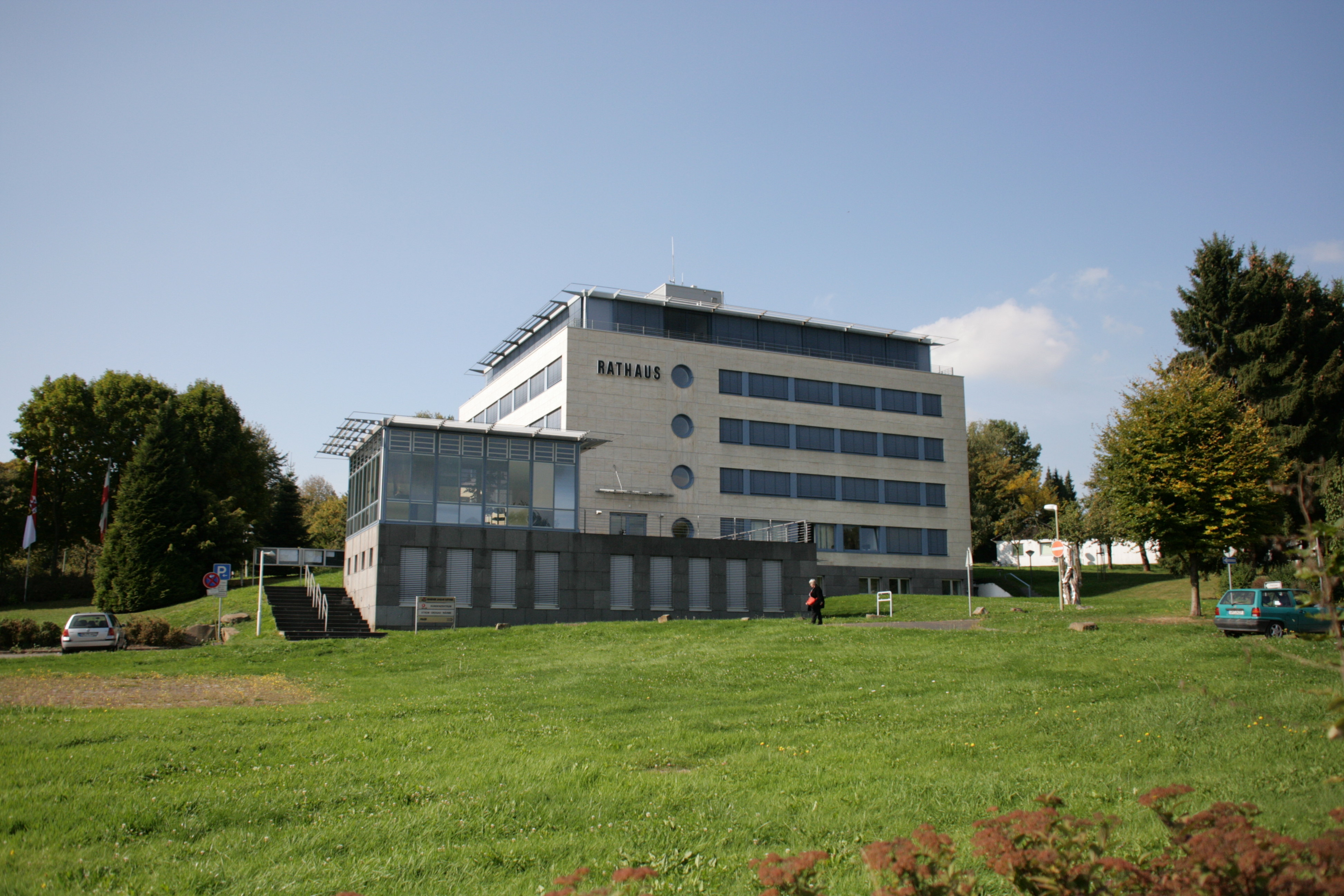 Rathaus, Boromäusstraße in Lindlar